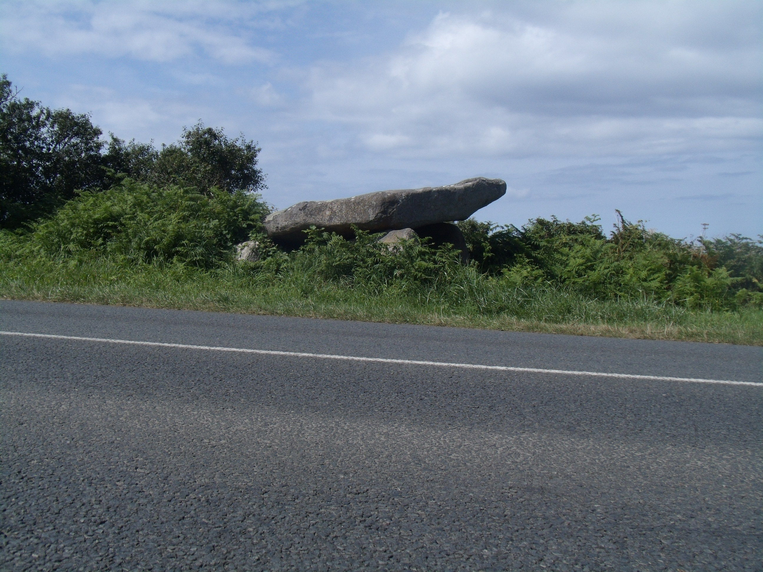 Le dolmen de Keryvon.